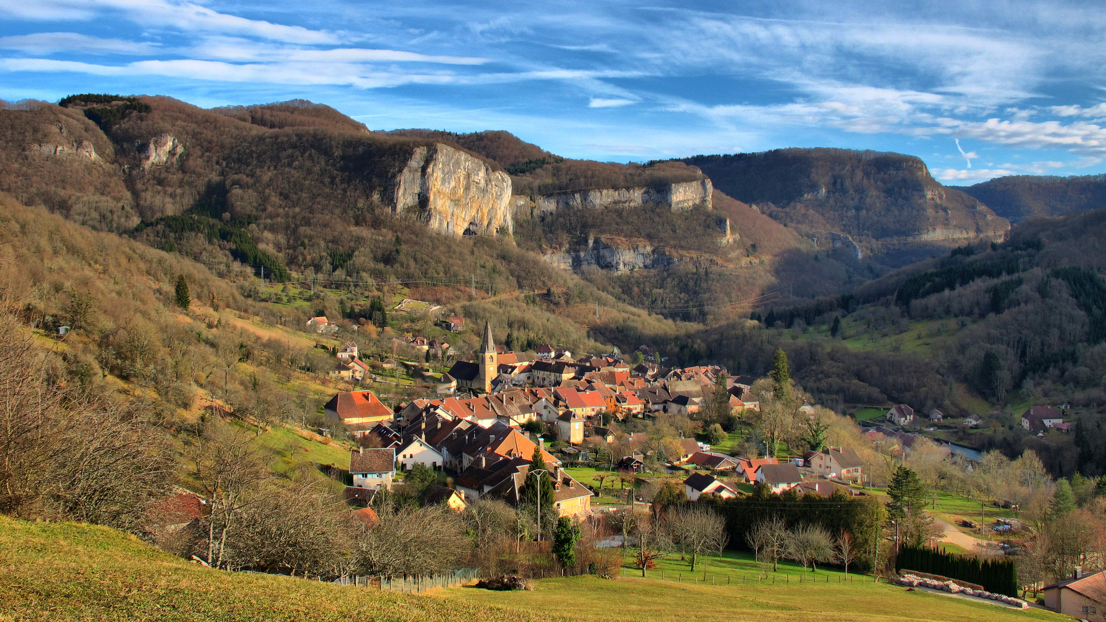 le village de Mouthier-Haute-Pierre devant les gorges de la Loue